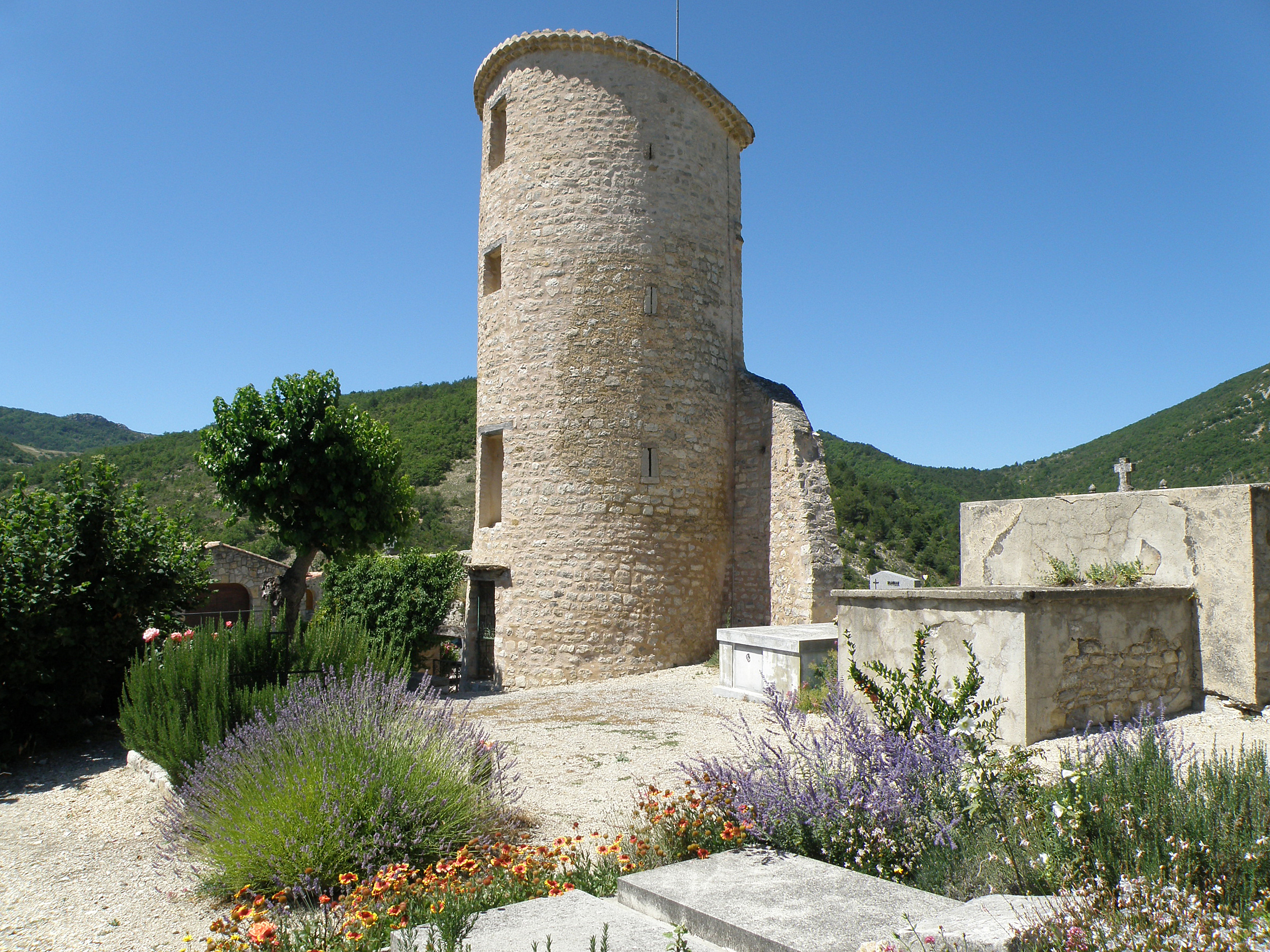 Rochebrune (Drôme). Château médiéval, tour d’angle.